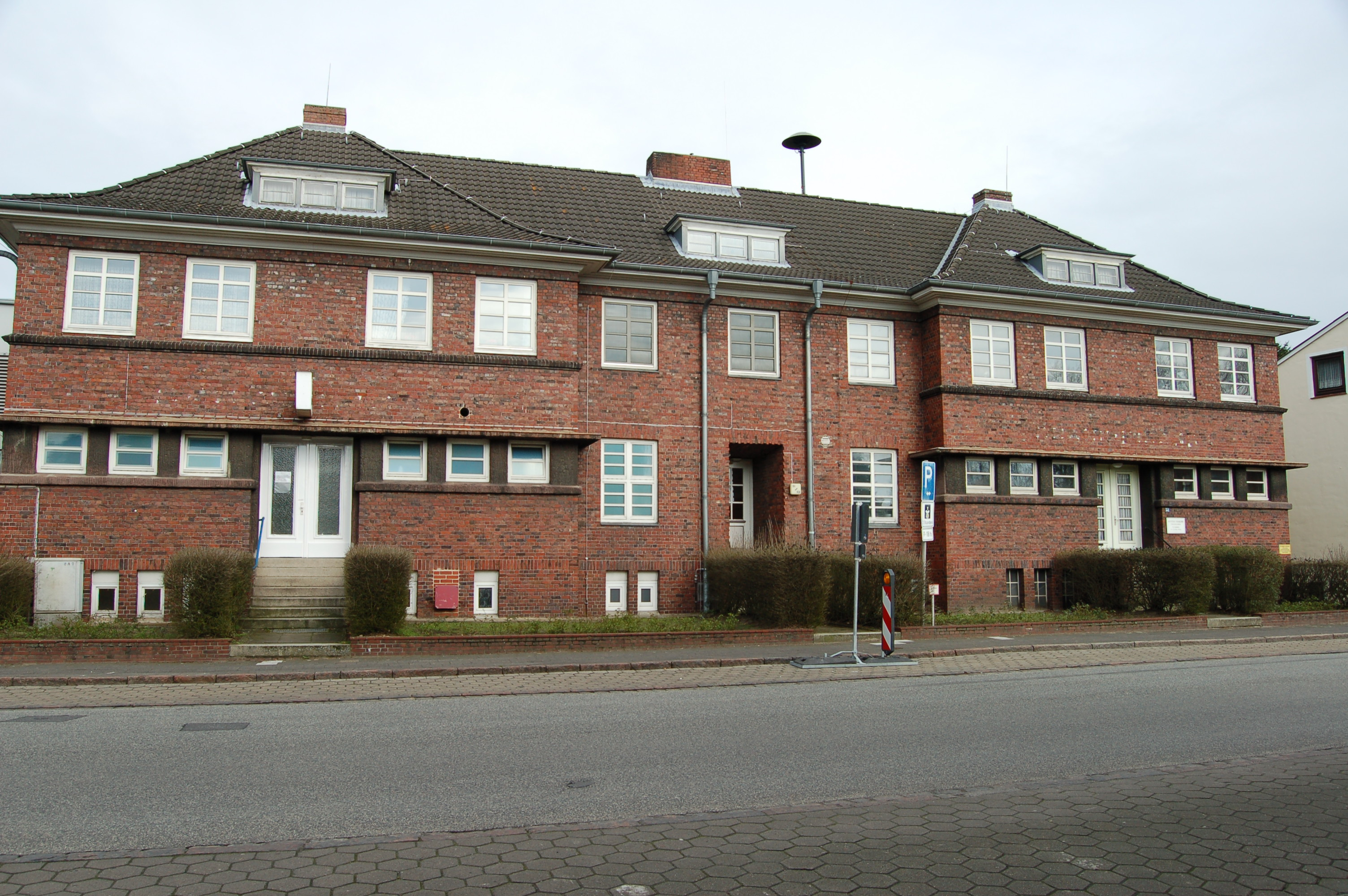 Das alte Uetersener Schwimmbad aus dem Jahr 1926. Es ist das erste das in Schleswig-Holstein gebaut wurde. Architekt: Klaus Groth This is a photograph of an architectural monument. It is on the list of cultural monuments of Uetersen